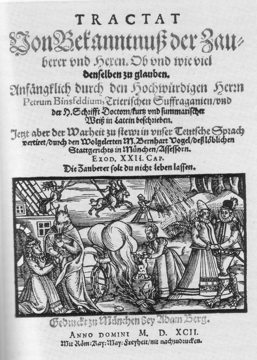 Petrus Binsfeld: Tractat von der Bekanntnuß der Zauberer und Hexen. München: Berg 1602